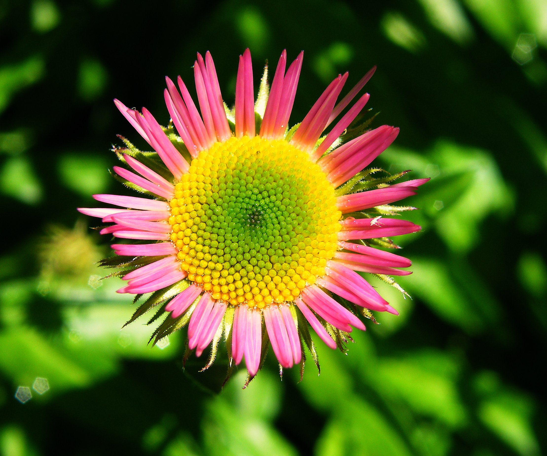 Oreostemma alpigenum.